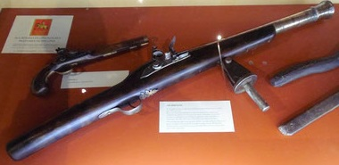 Pistola a pietra focaia e spingarda.